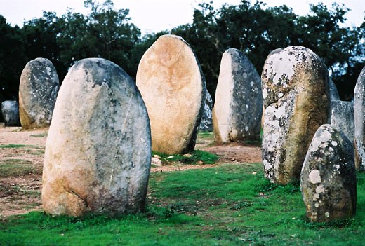 Le cromlech d'Almendres situé au sud-ouest de la ville d'Evora, Portugal est très connu pour le nombre de ses menhirs dressés et par les gravures qu'ils portent. A proximité de ce site archéologique, se trouve le dolmen géant de Zambujeiro et le dolmen réutilisé en chapelle de Sao Brissos. Source : Bruno MARC Licence : GFDL Bruno MARC